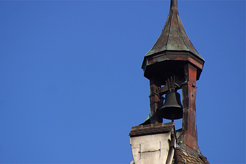 Schaffhausen: Munots-Glöcklein (Nr. 03.1-5205)